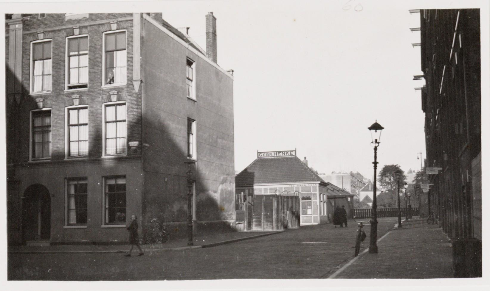 Beschrijving Deymanstraat gezien in oostelijke richting, met links Leeuwenhoekstraat 9 In het verschiet Deymanstraat 7, het bedrijfspand van de firma Gebrs. Henke, handel in steenkolen. In het verschiet de Tilanusstraat. Documenttype foto Vervaardiger Onbekend Anoniem Collectie Collectie Stadsarchief Amsterdam: foto-afdrukken Datering 1936 Geografische naam Leeuwenhoekstraat Deymanstraat Inventarissen Afbeeldingsbestand OSIM00004001422